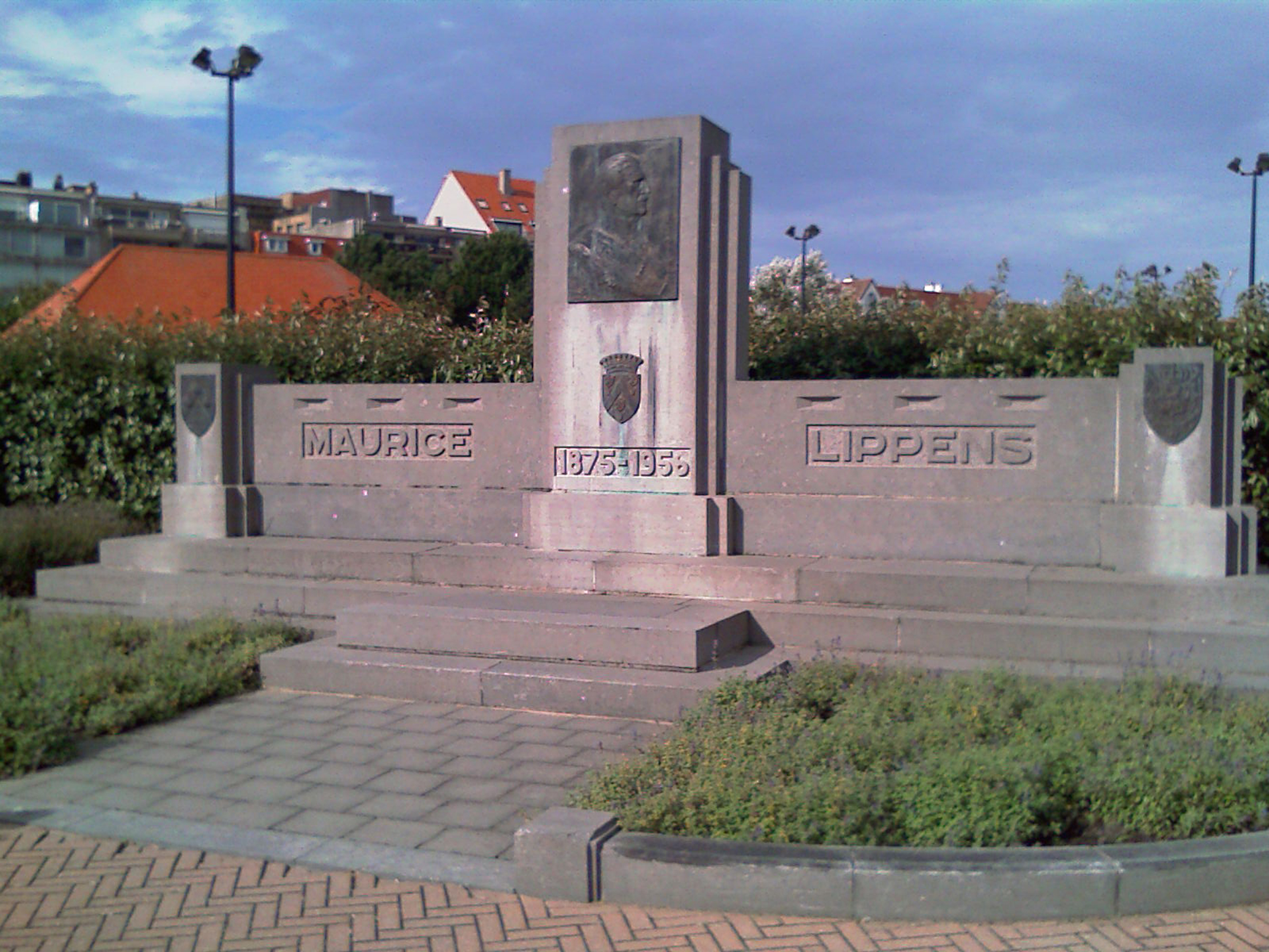 Monument en hommage au comte Maurice A. Lippens (1875-1956) au carrefour de la Sparrendreef et de la Prins Filiplaan à Knokke-Heist (Belgique).